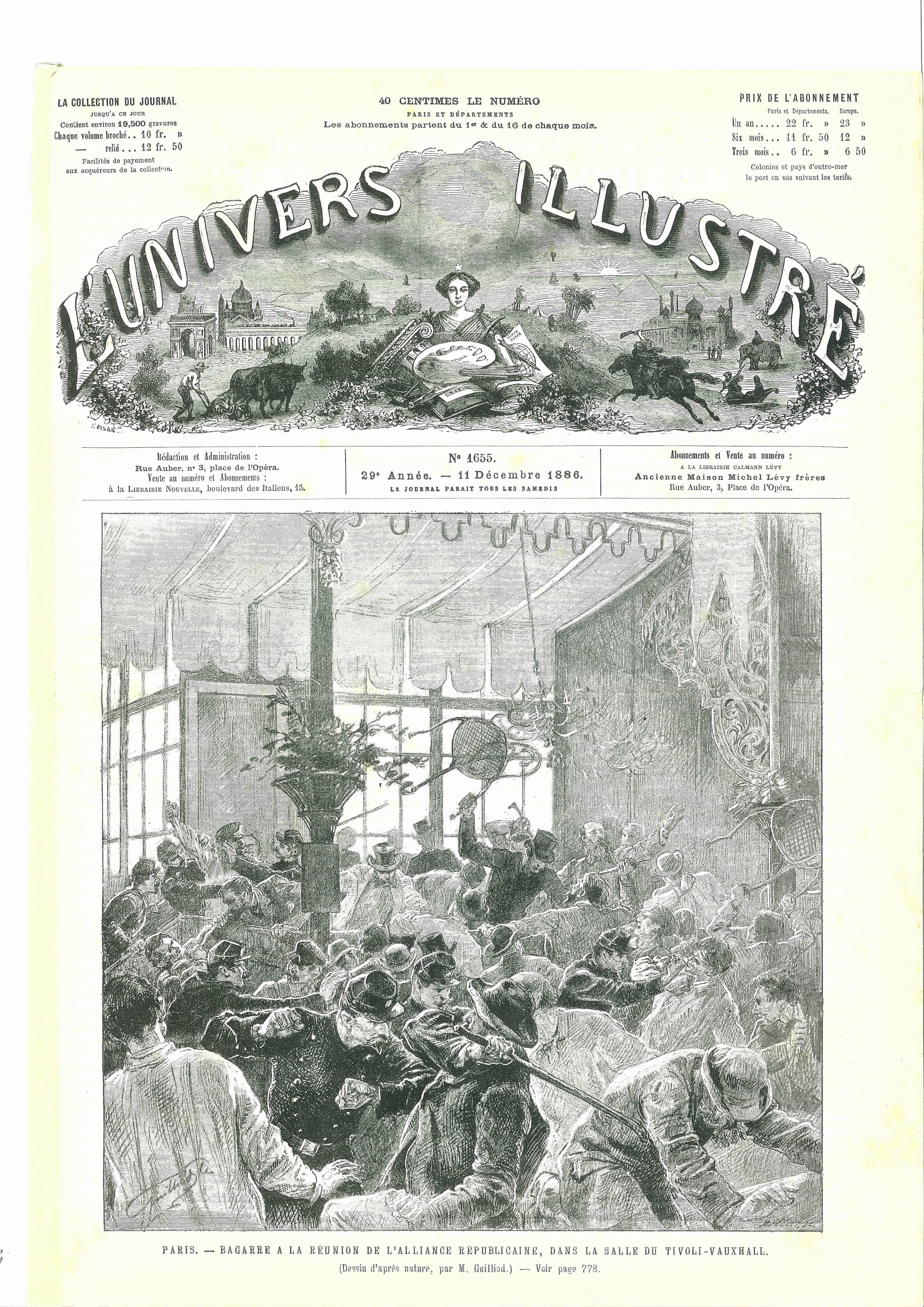 L'univers Illustré du 11 décembre 1886. Couverture: Dessin d'après nature, par M. Guilliod. -Paris. Bagarre à la Réunion de l'Alliance Républicaine, dans la Salle du Tivoli-Vauxhall.